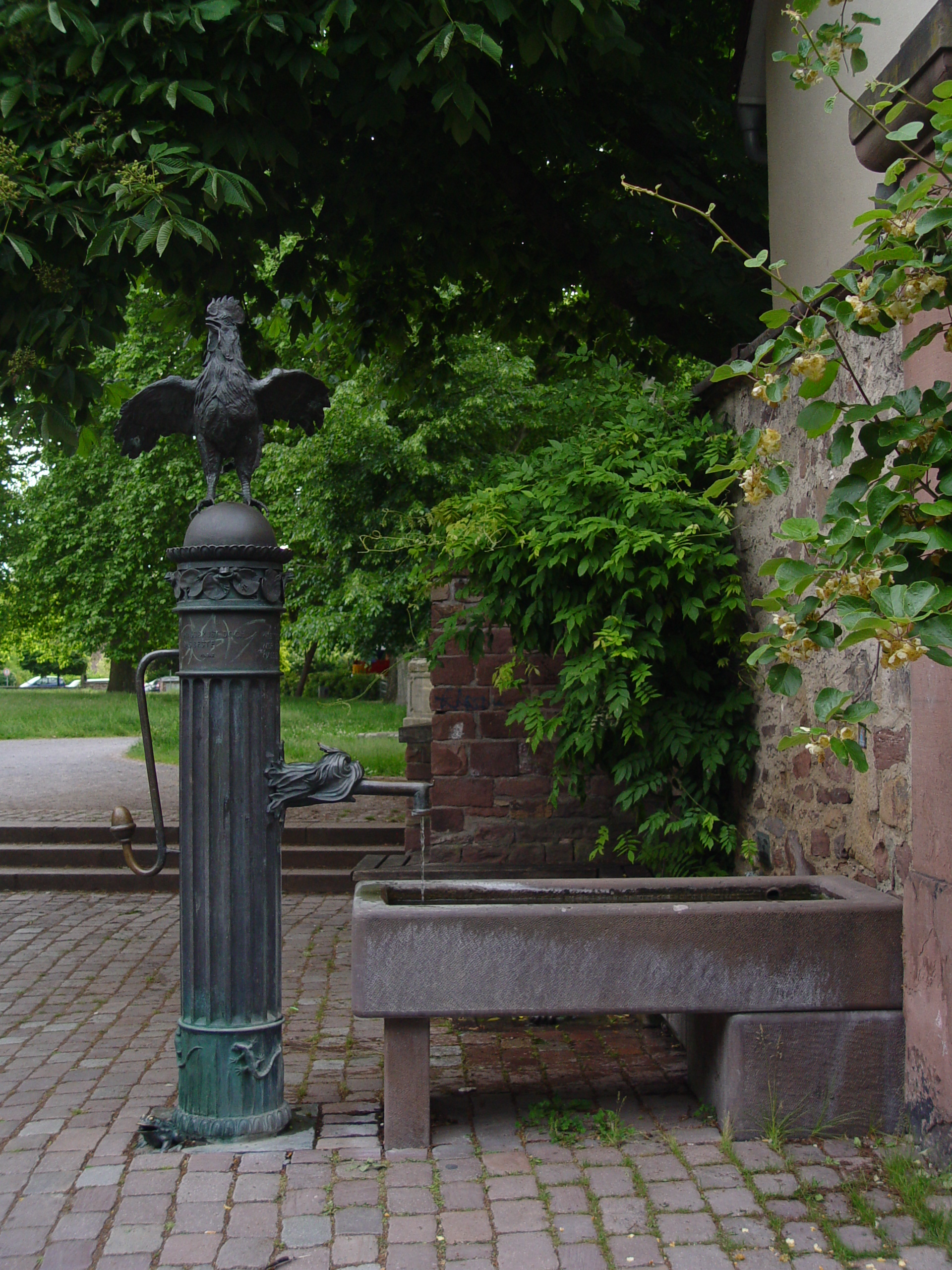 Hahnenbrunnen, Ulrich J. Sekinger